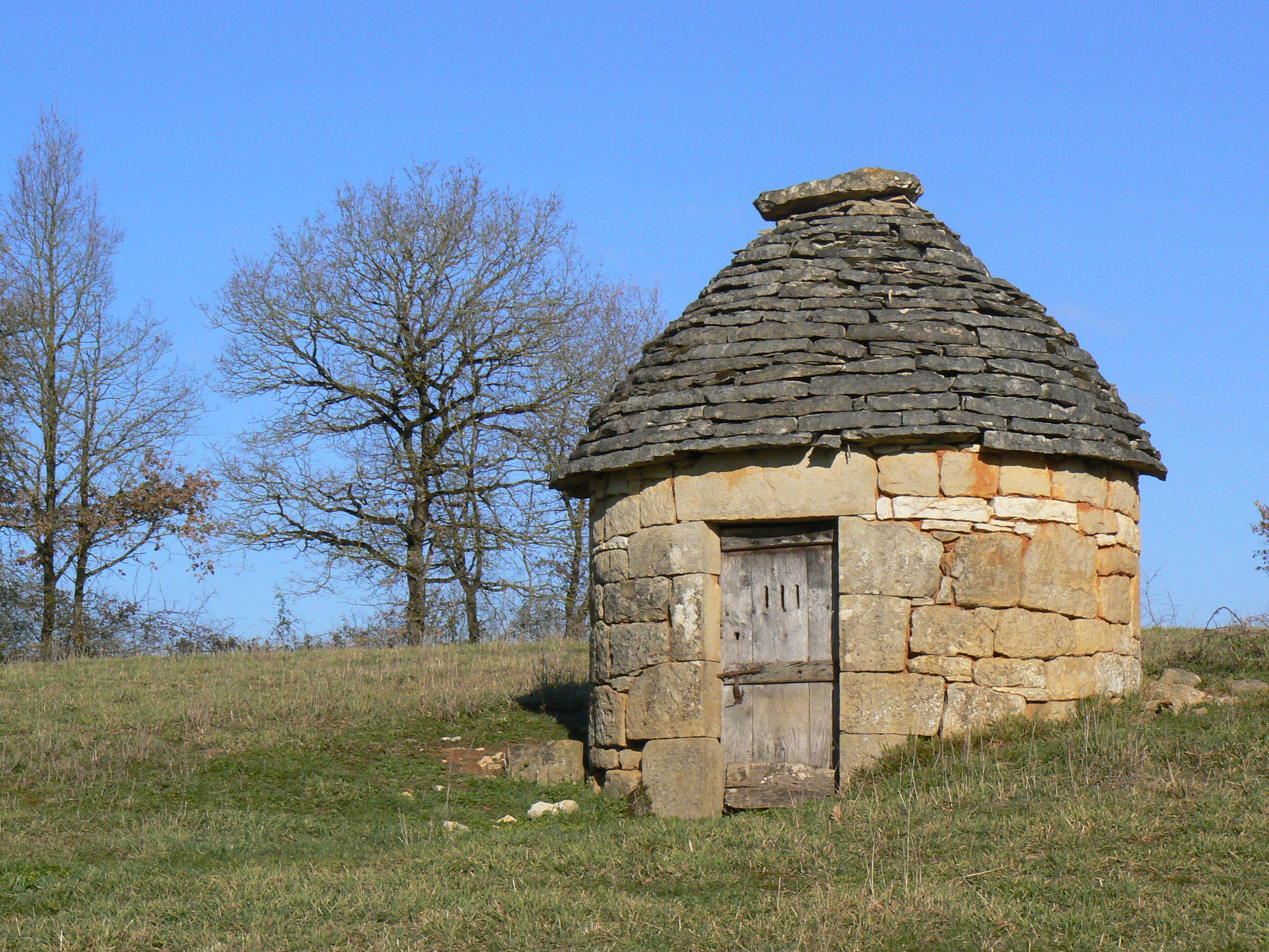 Monument réalisé par Henry Parayre (1926)